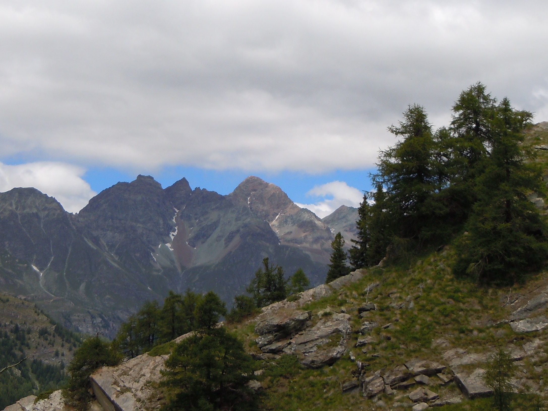 La Becca di Luseney ripresa dal Col Fenêtre